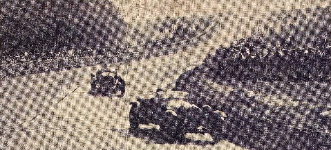 24 Heures du Mans 1932, les deux Alfa Romeo alors en tête.